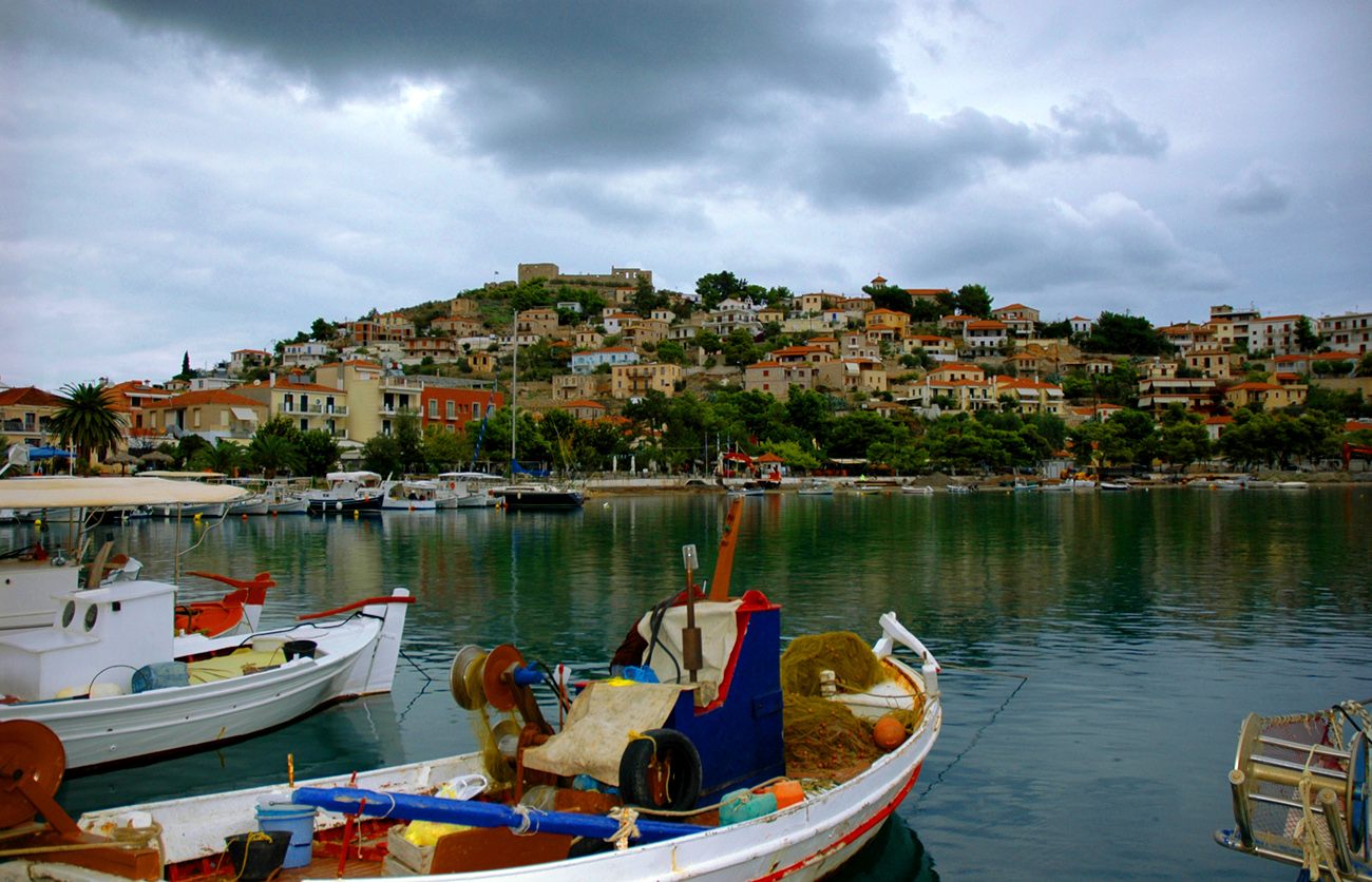 Paralio Astros, Greece